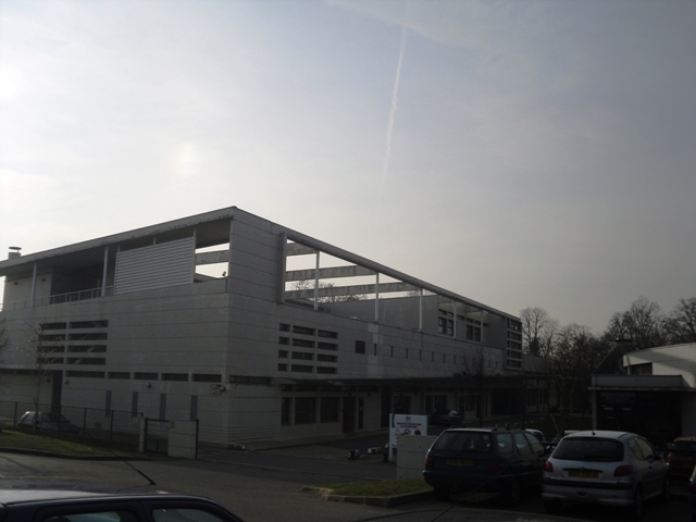 L'institut universitaire de technologie de Brétigny-sur-Orge (91)